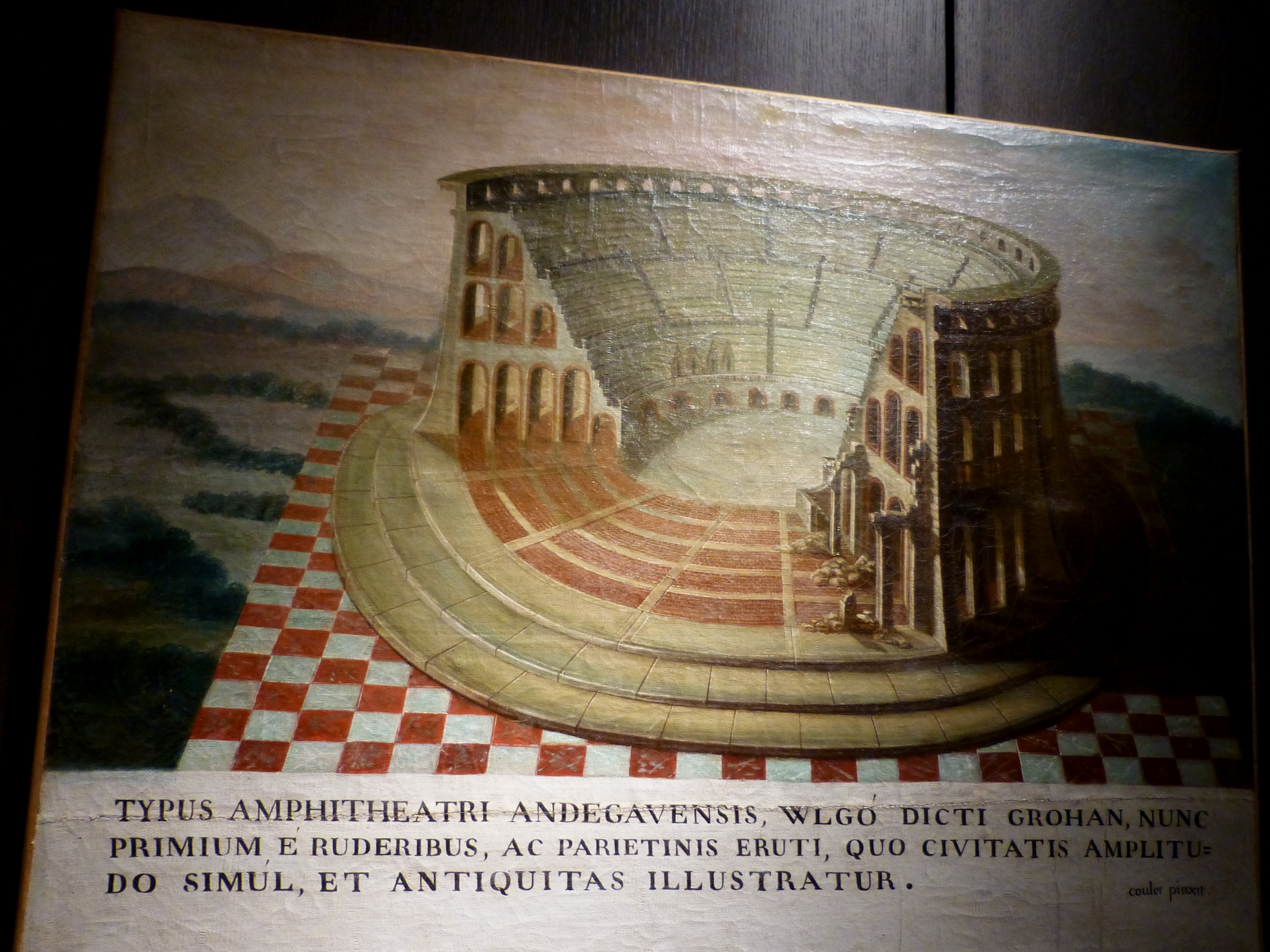 Angers, Musée des Beaux-Arts, Juliomagus-tableau de l'amphithéâtre de Grohan par Marie-Louis-Claude Coulet de Beauregard au XVIII° siècle.